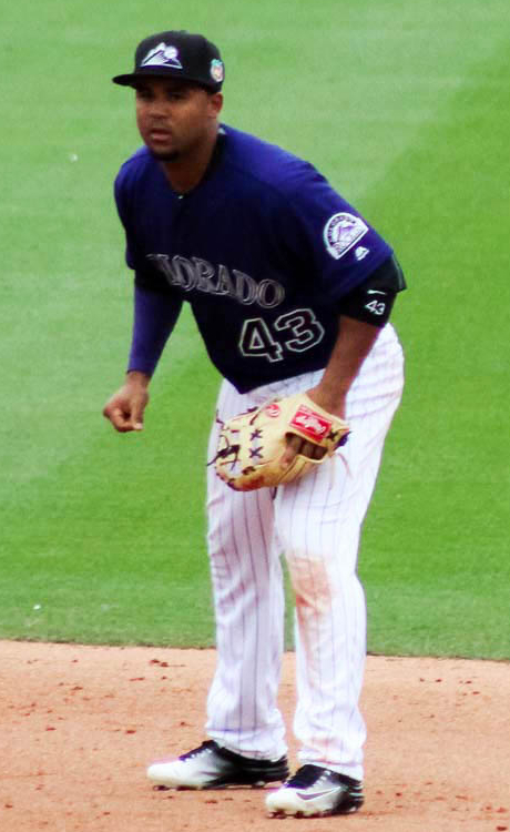 Rafael Ynoa